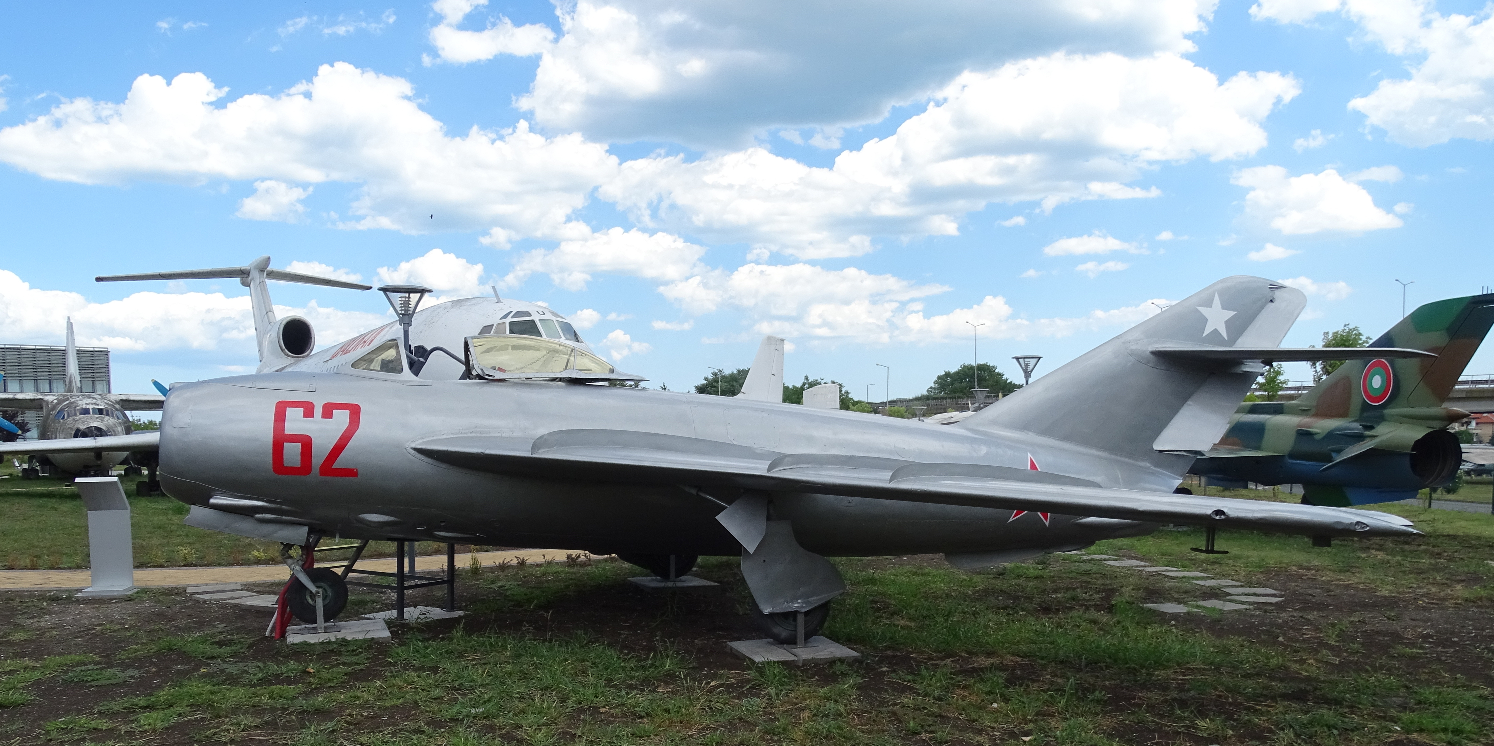 Mikojan-Goerevitsj MiG-17F in het Luchtvaartmuseum te Burgas (Bulgarije).